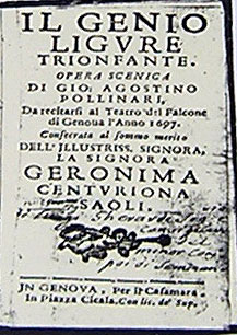 Frontespizio dell'edizione Casamara del 1697